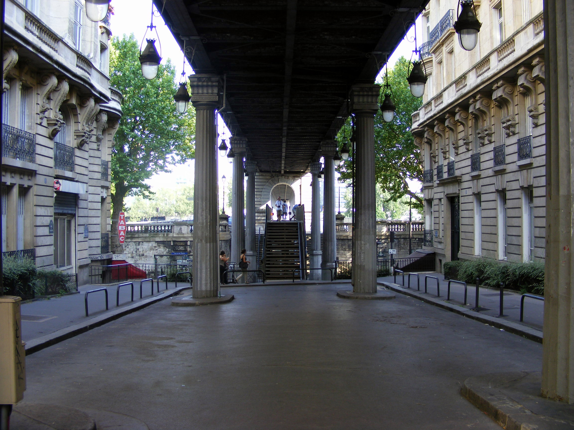 Pont de Bir-Hakeim, Paris